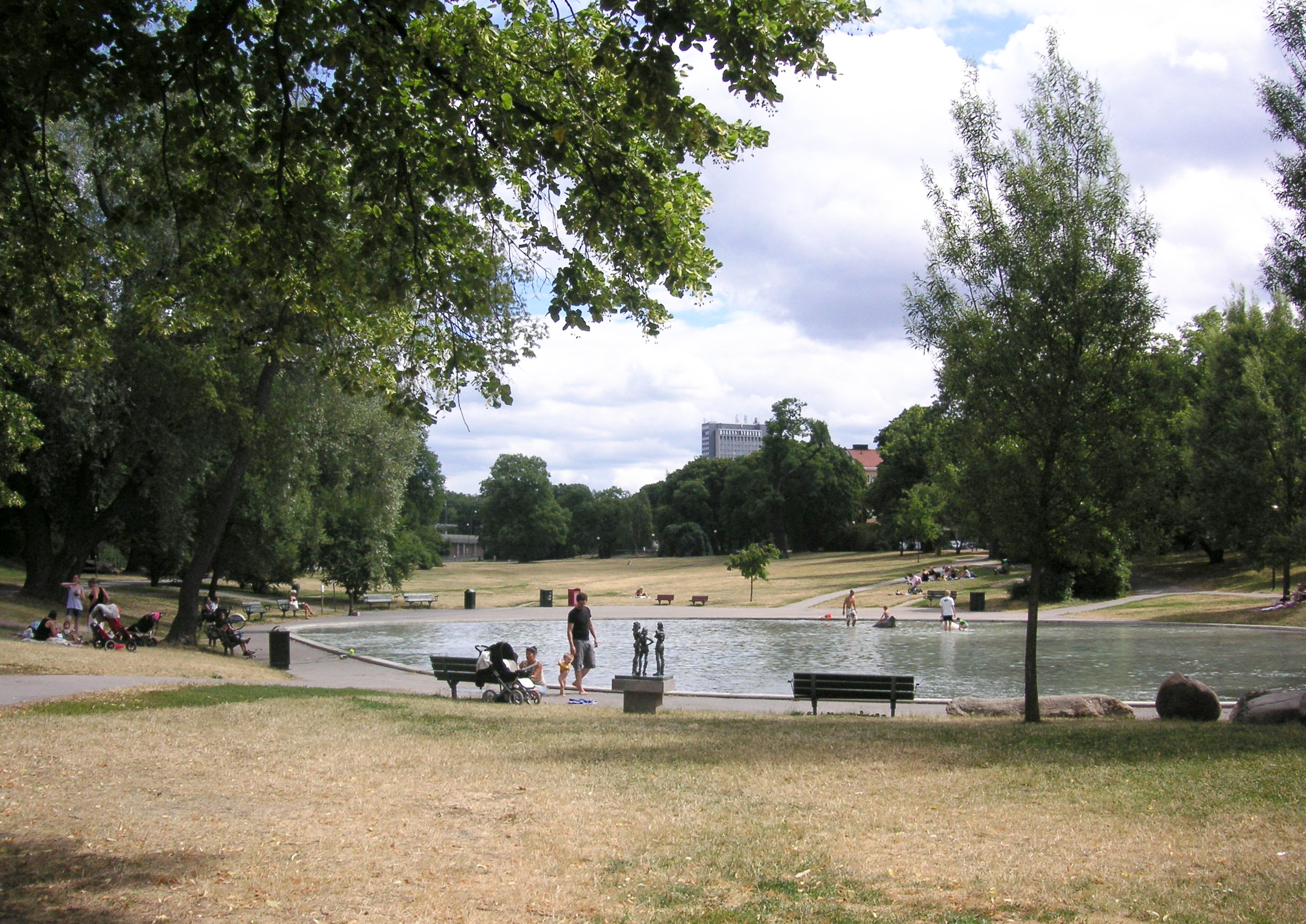 Fredhällsparken med plaskdammen, österut